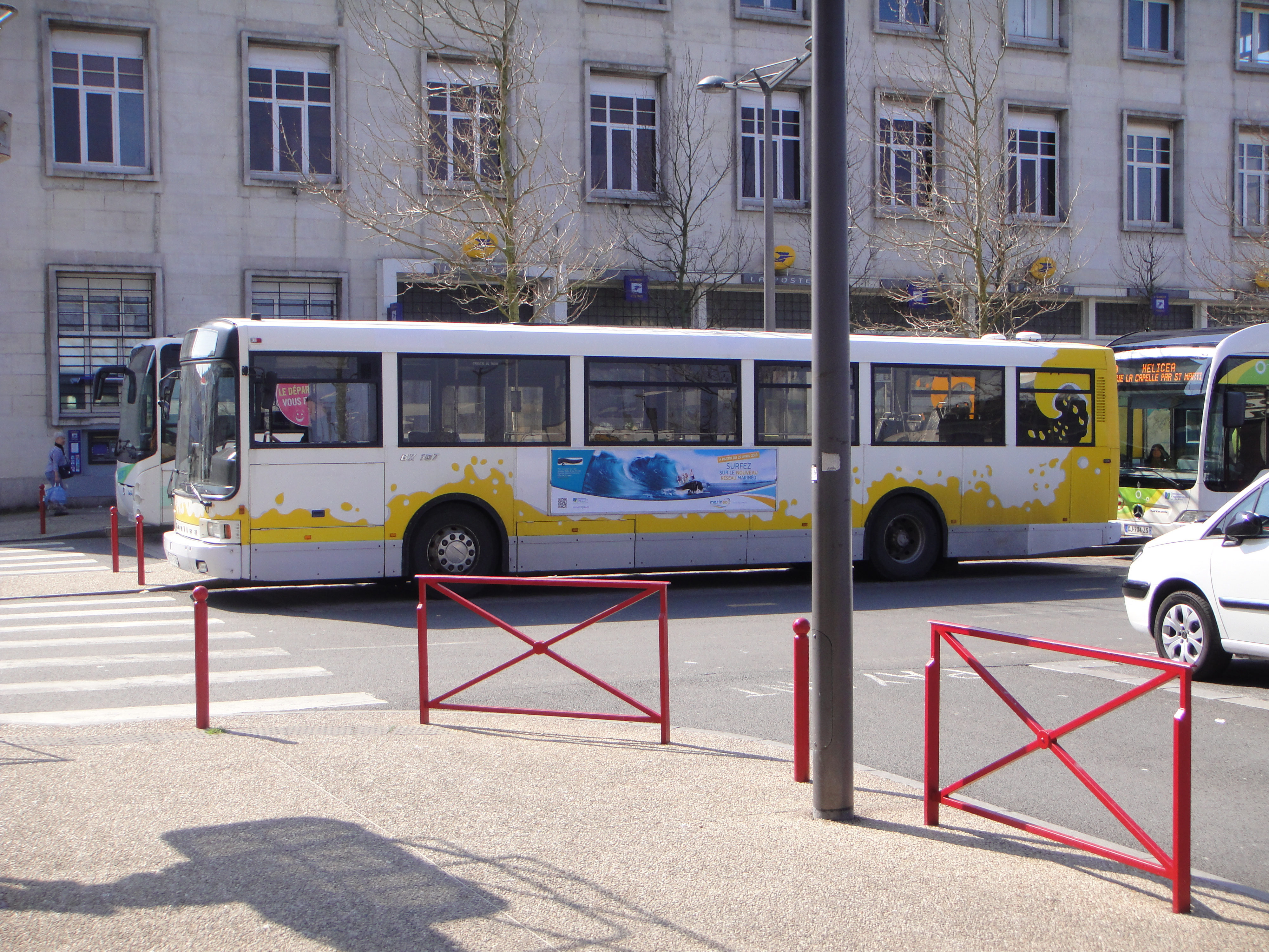 Bus TCRB à Boulogne-sur-Mer Photo prise par Bateloupreaut le 25 avril 2013